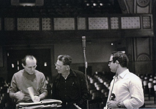 מרדכי סתר (במרכז) בחזרה של תזמורת קול ישראל בבניין ימק"א בירושלים. משמאל – המנצח גארי ברתיני (מס' קטלוגי: MUS 110 / L12)